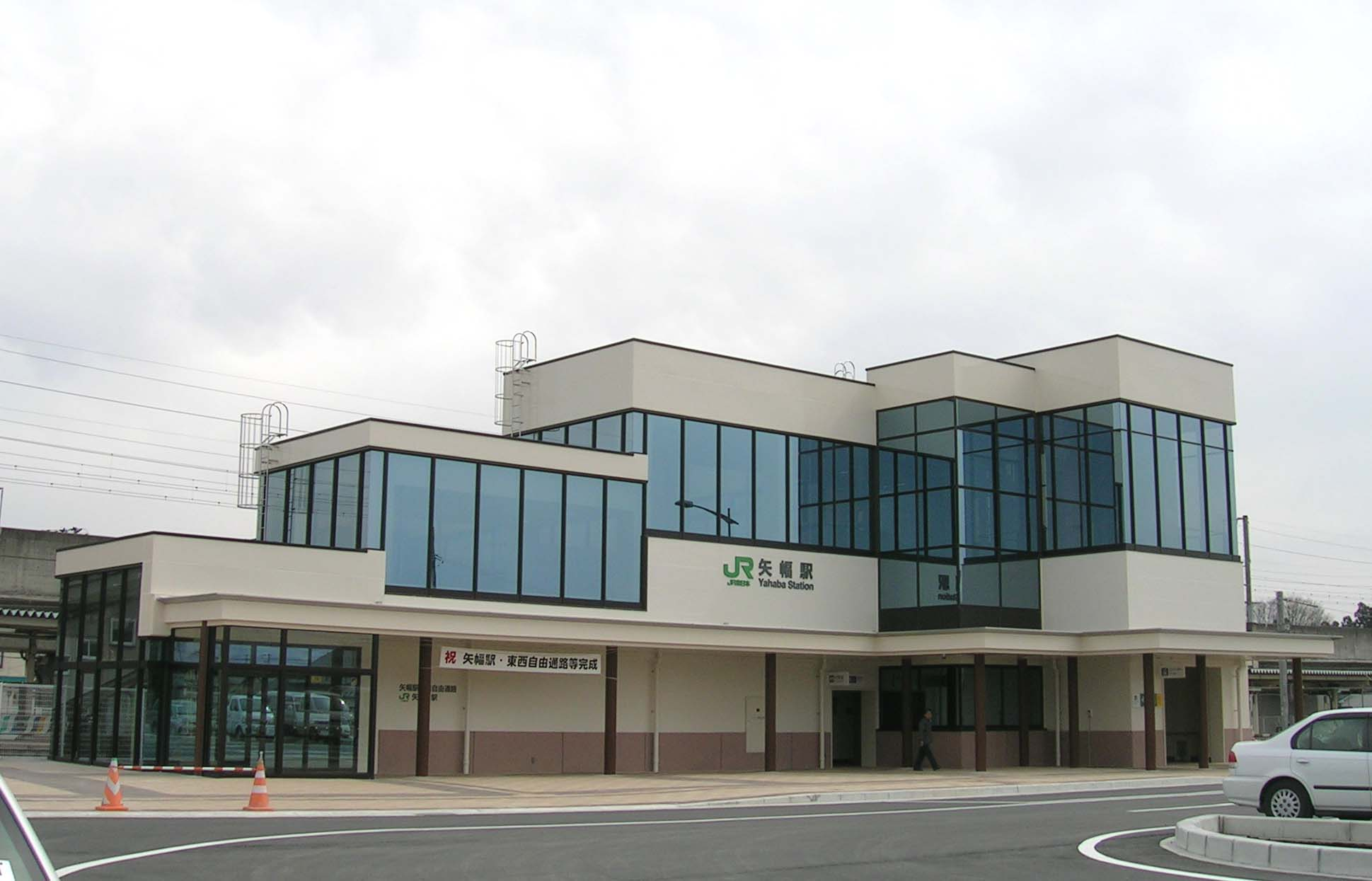 Yahaba Station, Yahaba, Iwate, Japan